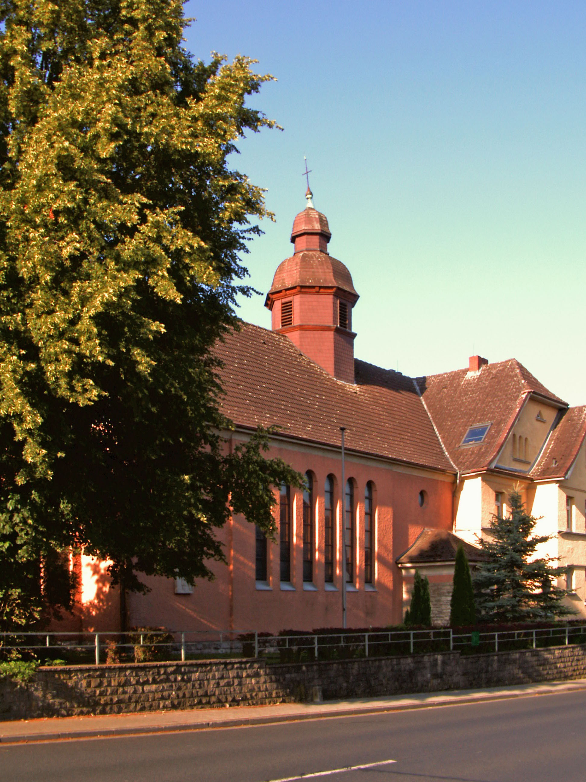 Katholische Kirche St. Joseph in Schöppenstewdt, Landkreis Wolfenbüttel